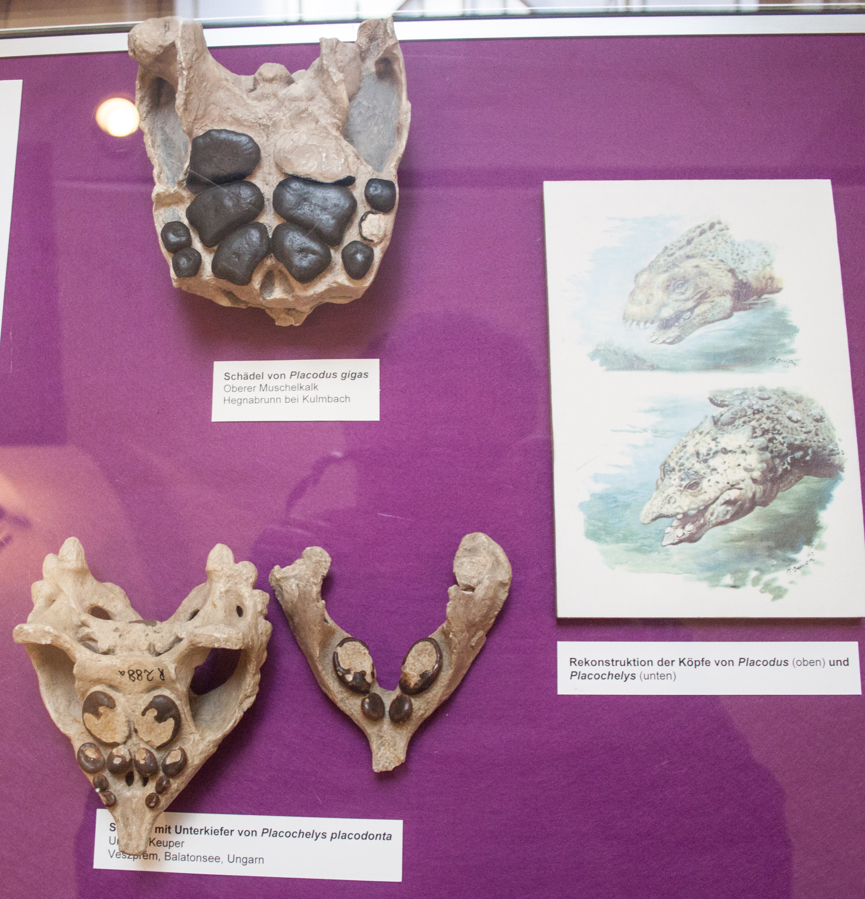 Placodontia